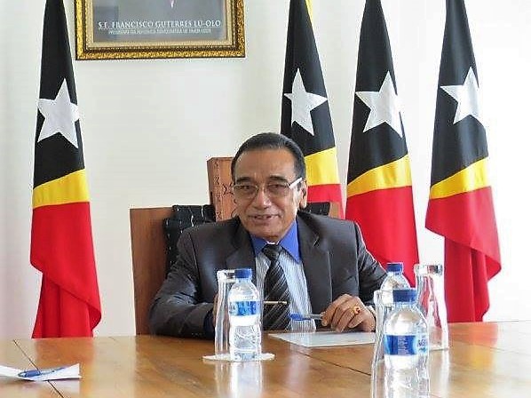 Francisco Guterres, Präsident von Osttimor